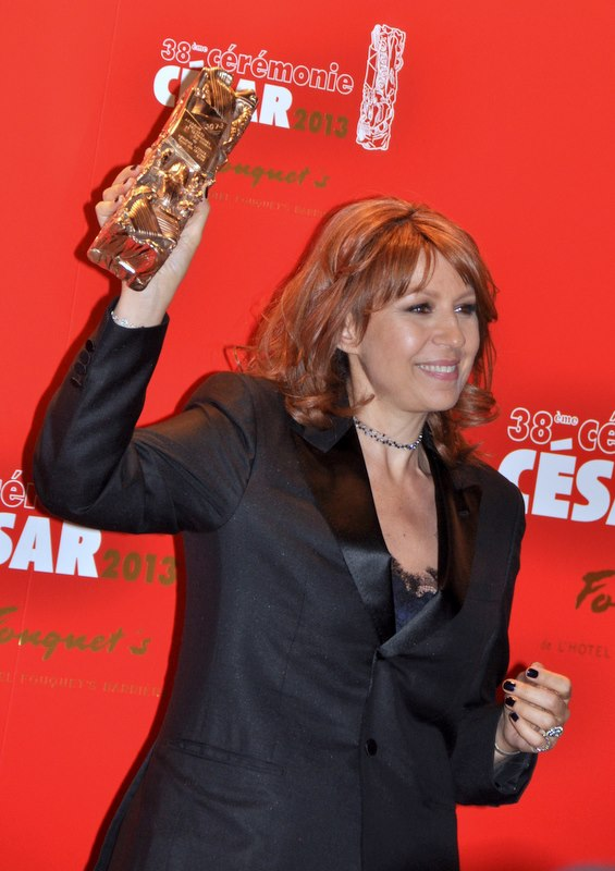 Valérie Benguigui à la cérémonie des César